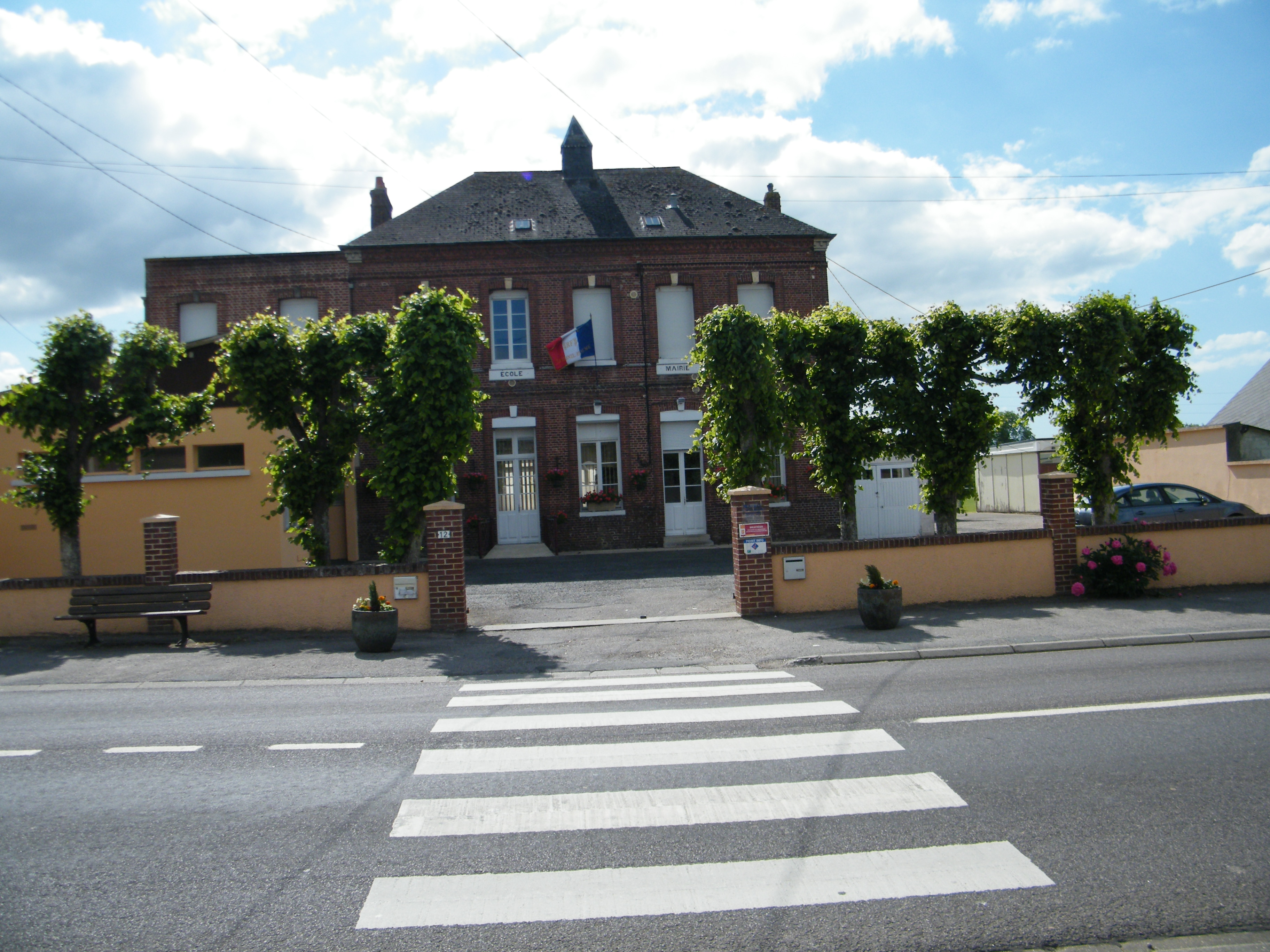 Mairie.